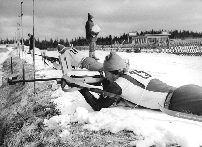 Klaus Siebert, Karl-Heinz Menz ADN-ZB Häßler 6.3.76-str- Bez. Dresden: DDR-Biathlon-Meisterschaften- Am Schießstand während des 20-km-Einzelrennen der Senioren absolvierten die Aktivisten das Liegend-Schießen. Vorn rechts Klaus Siebert (Dynamo Zinnwald), dahinter Karl-Heinz Menz (ASK Oberhof).